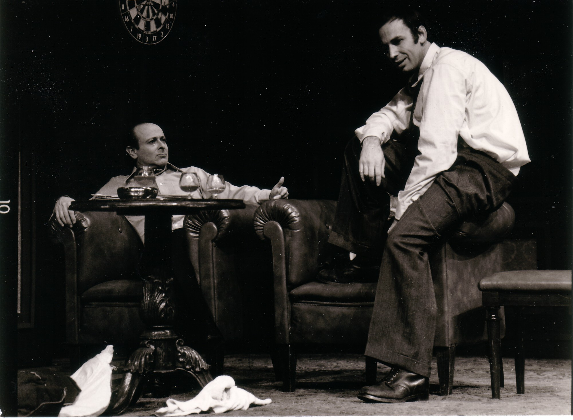 Szenenfoto von Anthony Shaffers Revanche (Sleuth) mit Buddy Elias als Andrew Wyke und Tom Witkowski als Milo Tindle im Nationaltheater Mannheim